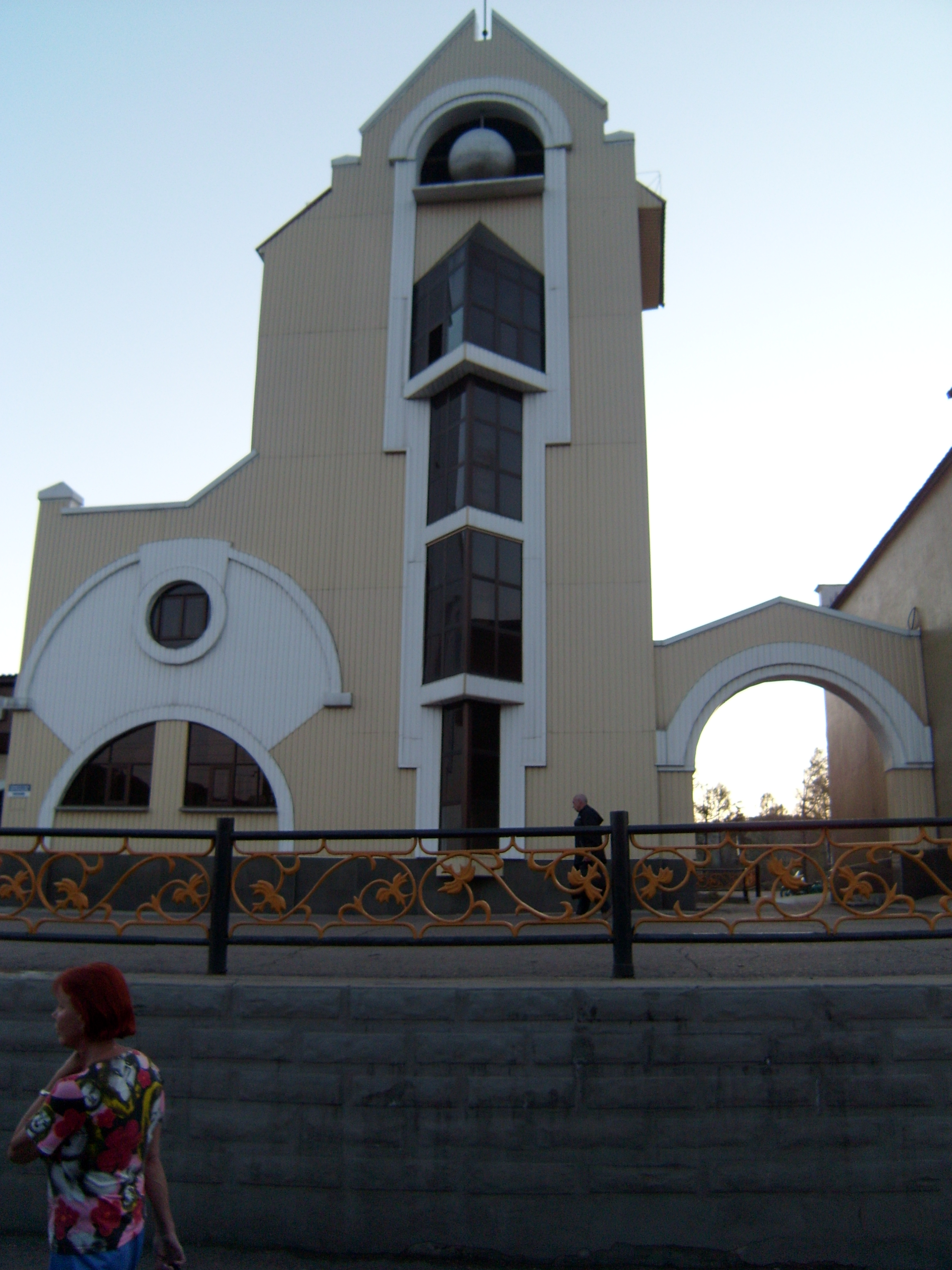 Петровский завод, вокзал